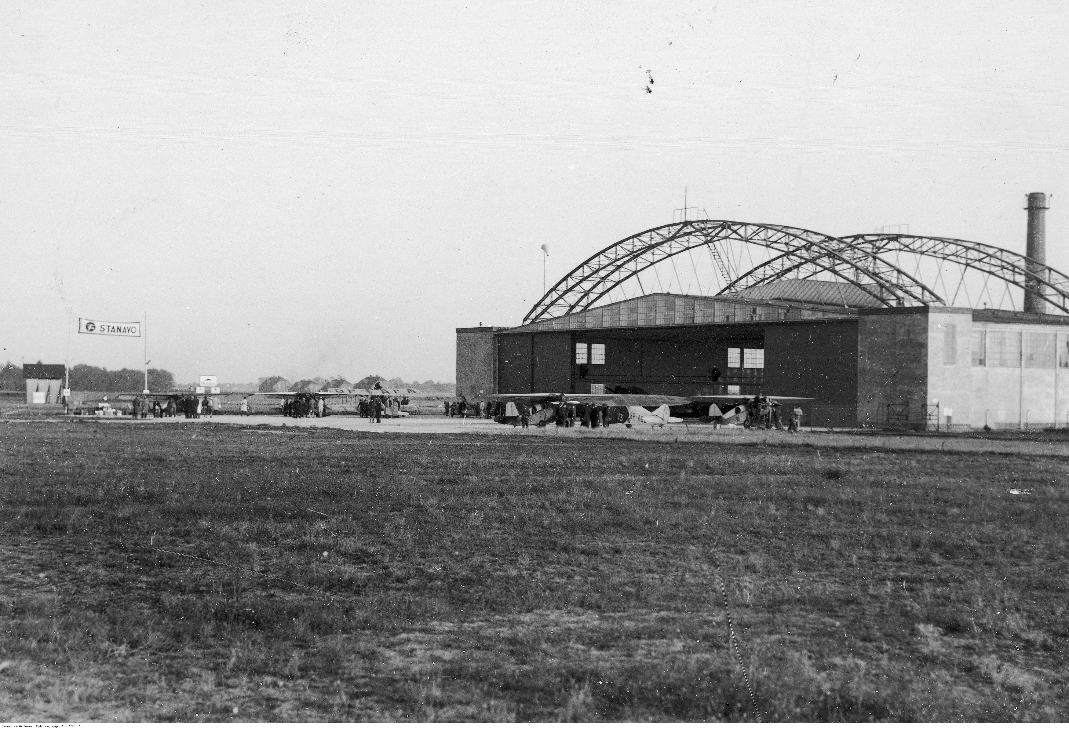 Widok ogólny lotniska w Poznaniu z samolotami uczestniczącymi w IV Krajowym Konkursie Samolotów Turystycznych. Z prawej widoczne dwa RWD-4 z numerami startowymi 15 (SP-AEY) i 16, pomiędzy nimi LKL-2 SP-ADE (nr 13), a po środku w oddali PZL.5 SP-AFM.